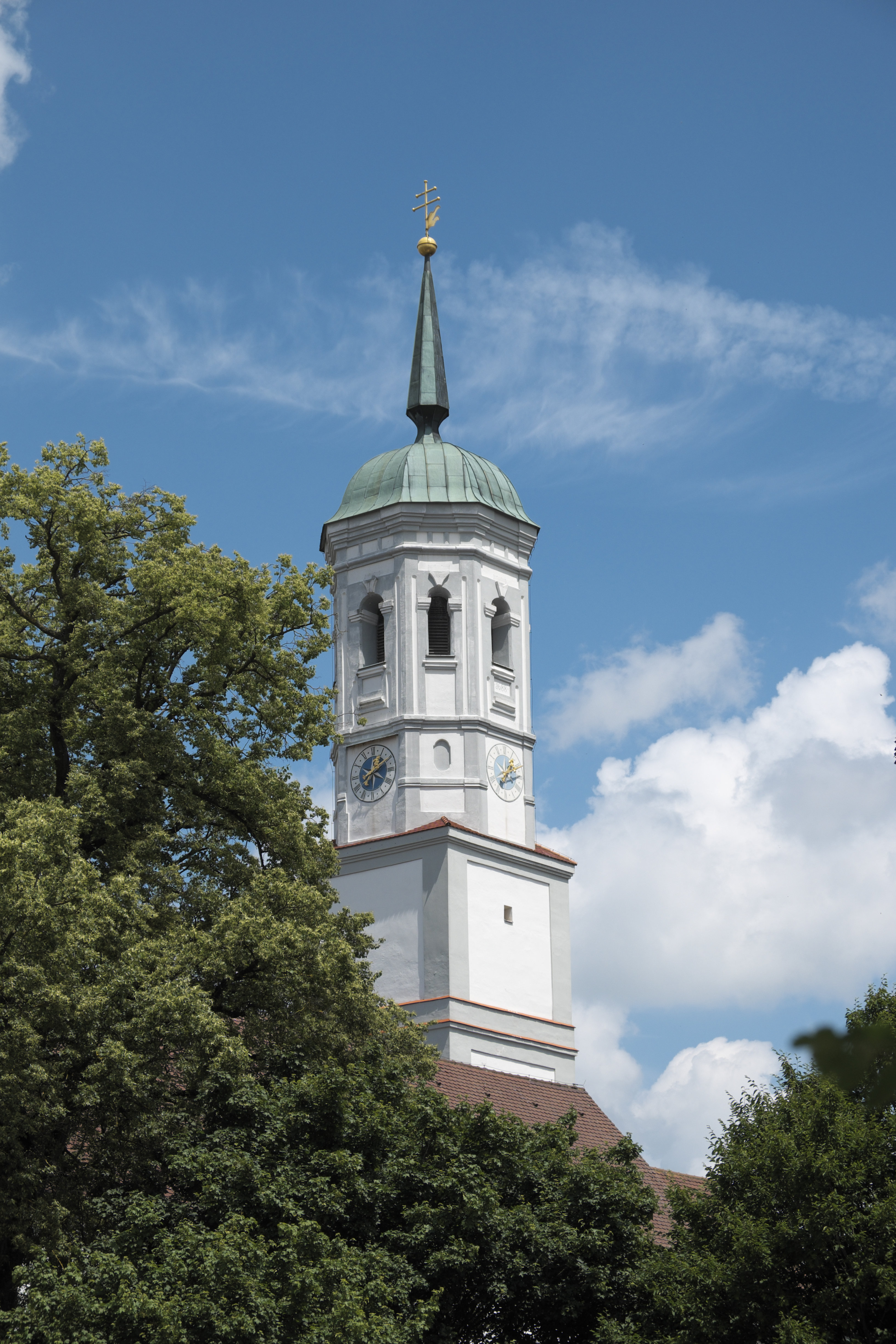 Katholische Pfarrkirche St. Jakob in Mammendorf im Landkreis Fürstenfeldbruck (Bayern/Deutschland), klassizistisches Kapitell